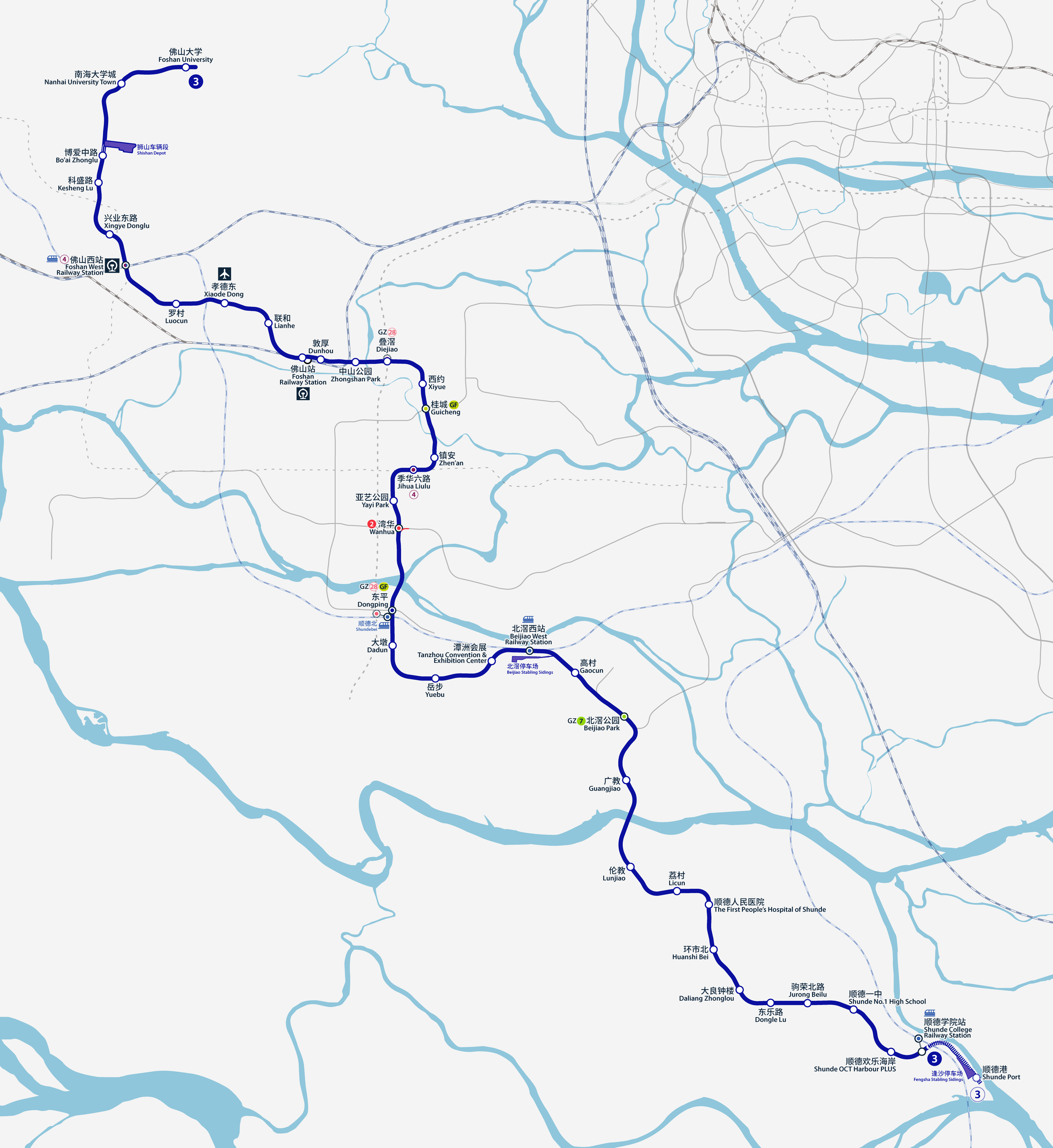 佛山地鐵3號線線路圖，按真實走向比例繪畫